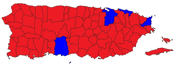 Resultado de la Votacion a Gobernador 1972